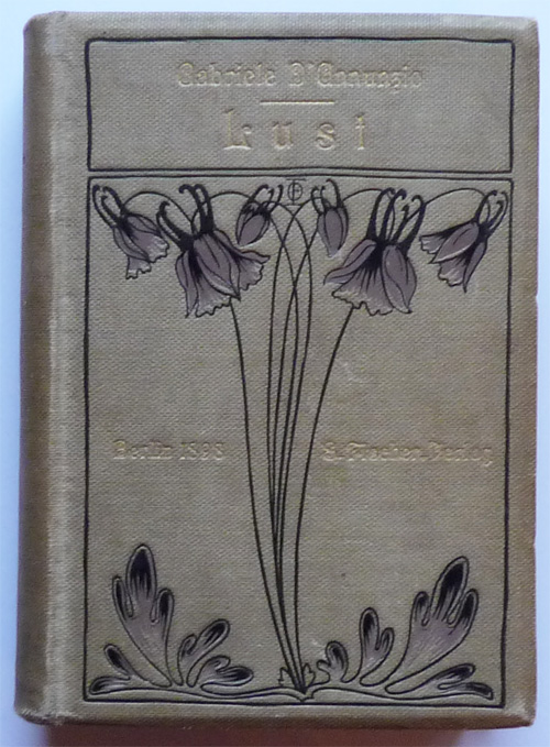 Lust, Deutsche Erstausgabe, Fischer, Berlin 1898